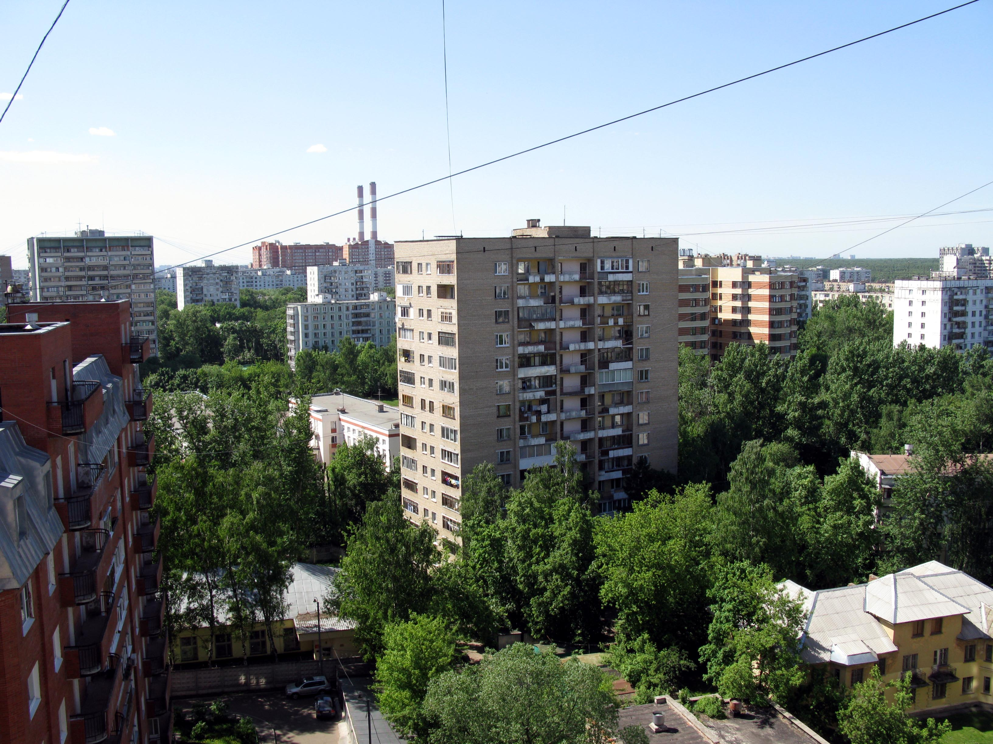 Goliyanovo, Moscow